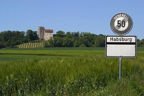 Habsburg (Nr. 03.1-5024)